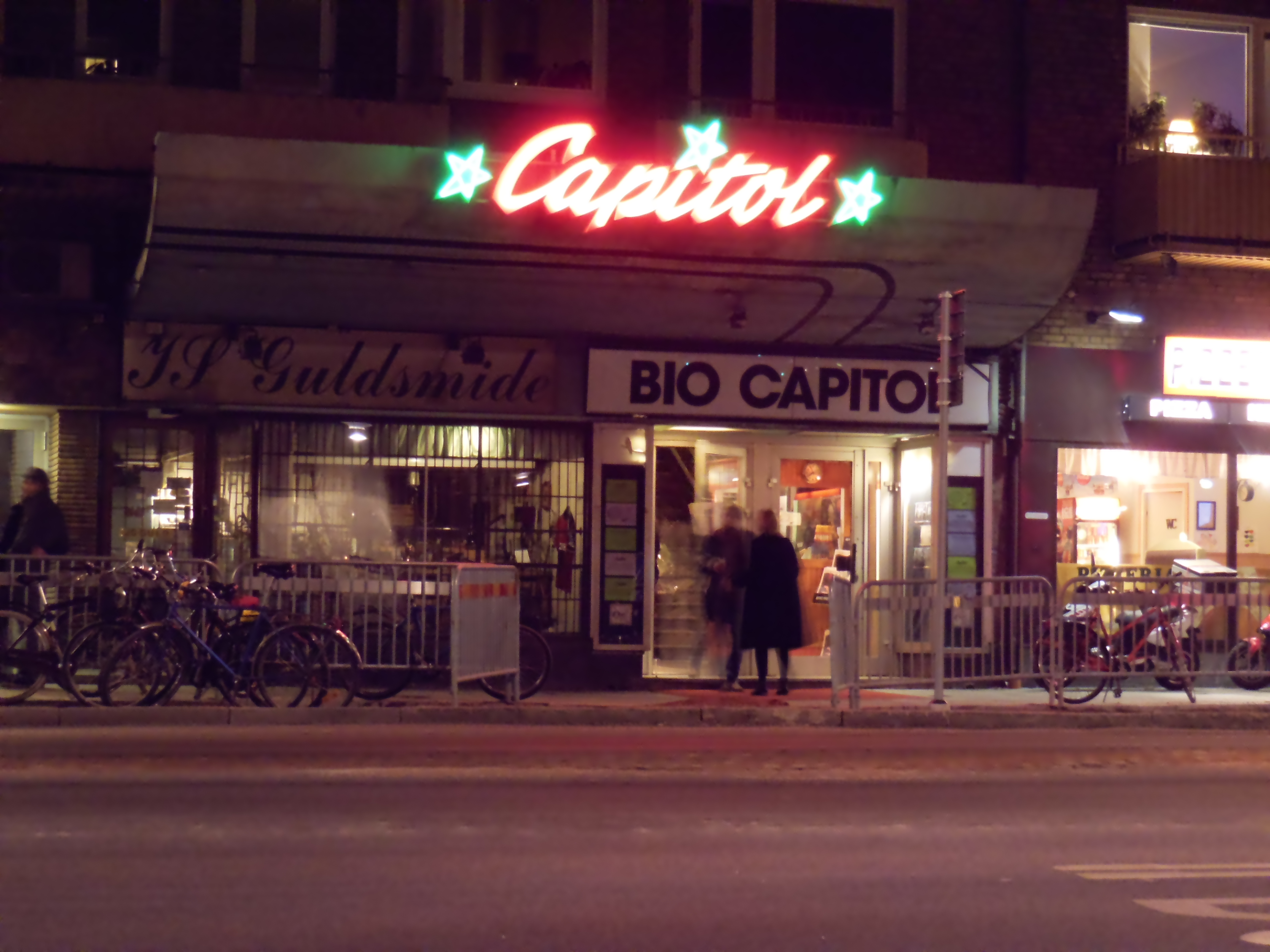 Ingången till biografen Capitol i Göteborg, 1 mars 2013.